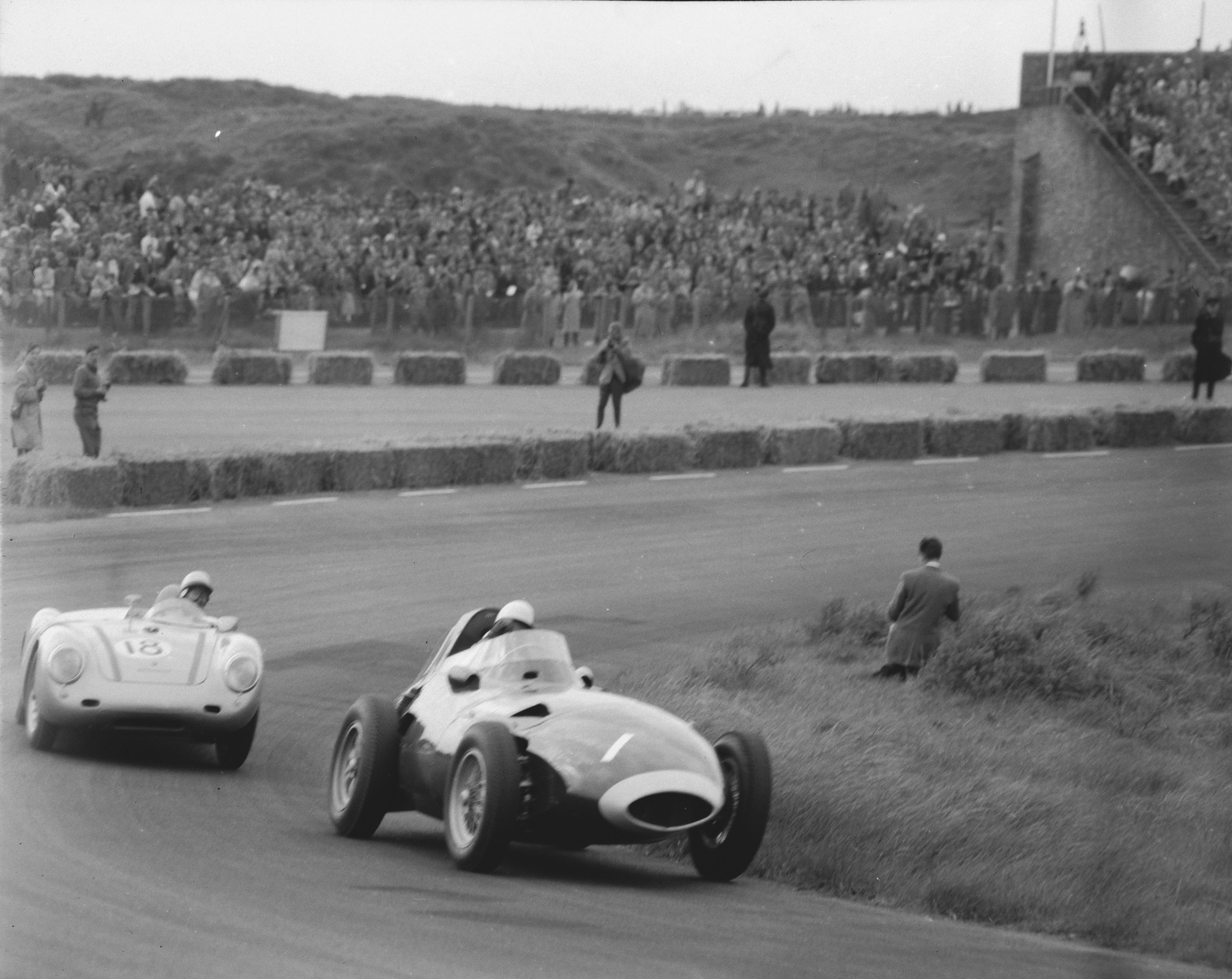 Collectie / Archief : Fotocollectie Anefo Reportage / Serie : [ onbekend ] Beschrijving : "Grote prijs van Nederland" op het circuit van Zandvoort / aangetast Datum : 26 mei 1958 Locatie : Noord-Holland, Zandvoort Fotograaf : Pot, Harry / Anefo Auteursrechthebbende : Nationaal Archief Materiaalsoort : Negatief (zwart/wit) Nummer archiefinventaris : bekijk toegang 2.24.01.04 Bestanddeelnummer : 909-5855 Reacties Geplaatst door Luc Ghys op 03 september 2016 - 10:37. Stirling Moss in een Vanwall, gevolgd door Carel Godin de Beaufort in een Porsche.